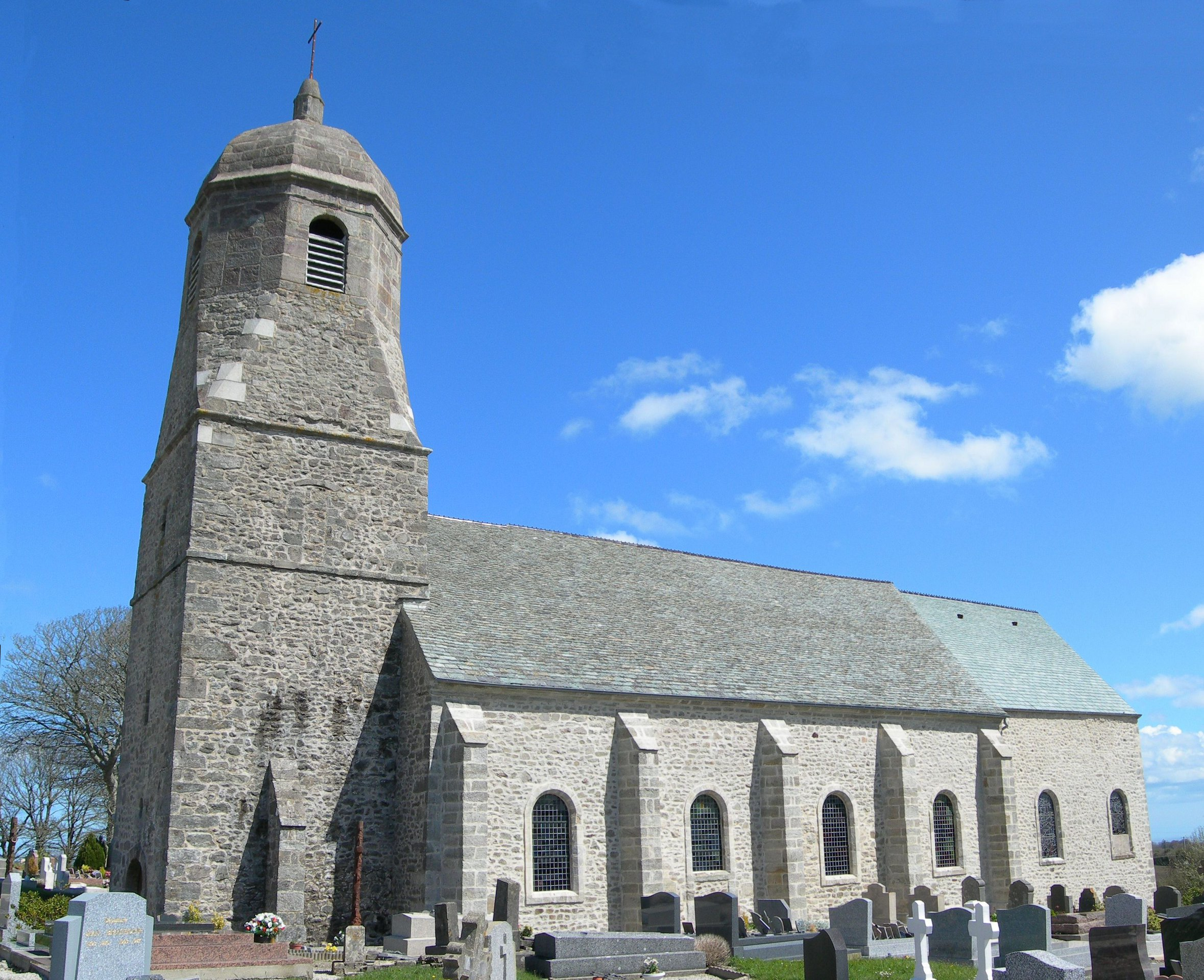 Église de Sainte-Croix-Hague